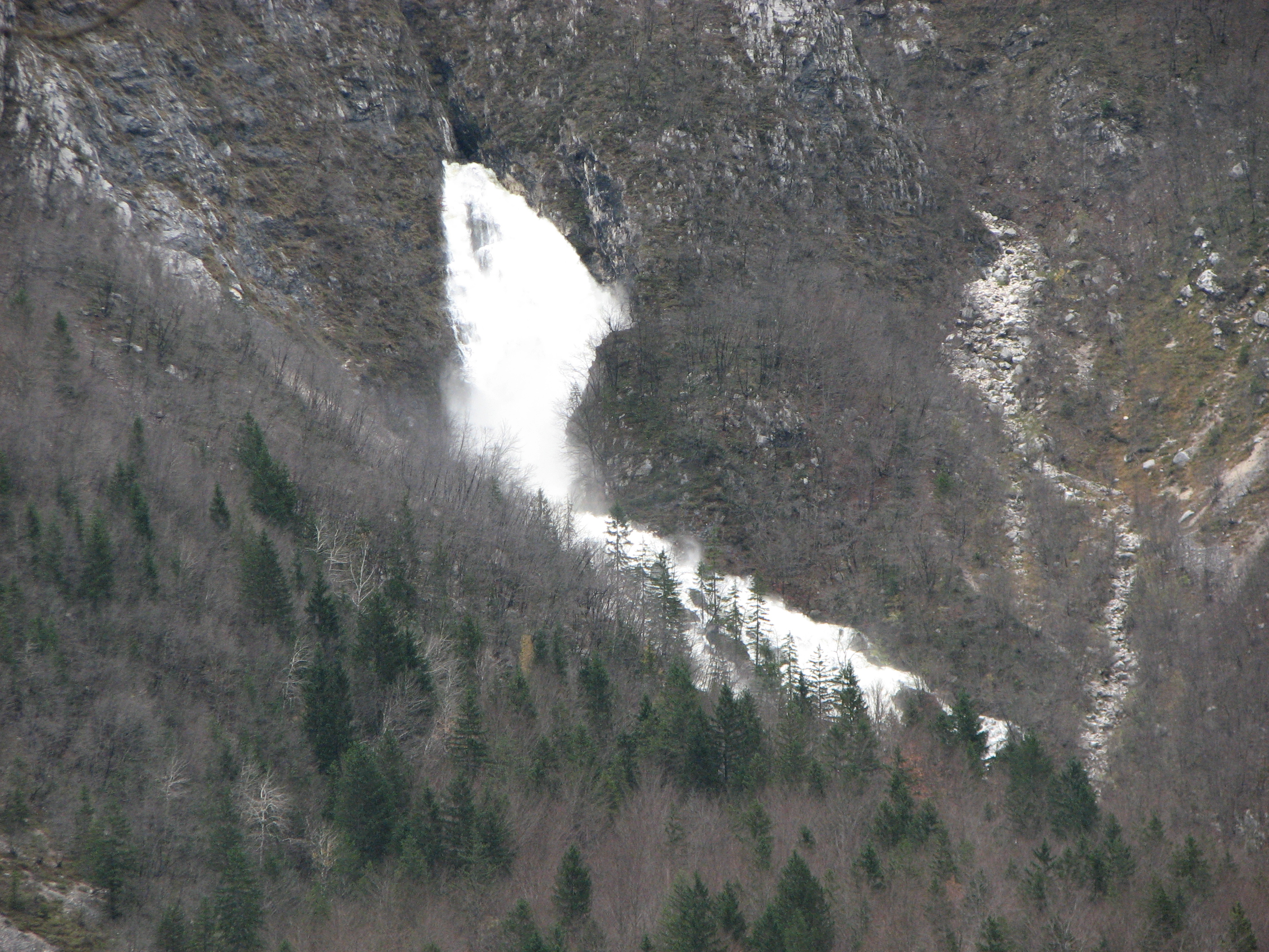 Slap Govic.